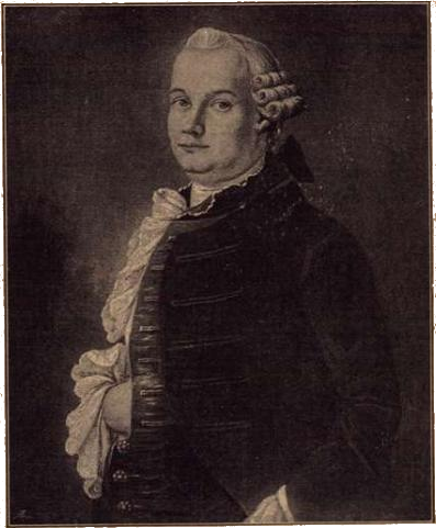 Morten Leuch på Bogstad (1732–1768).